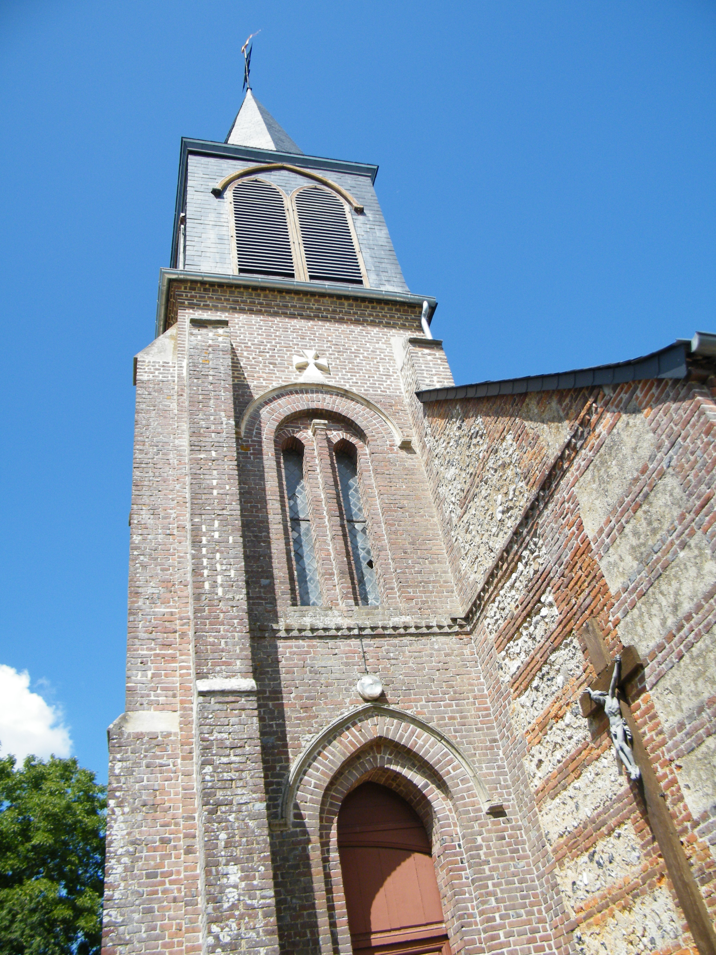 Baillolet, Seine-Maritime, France